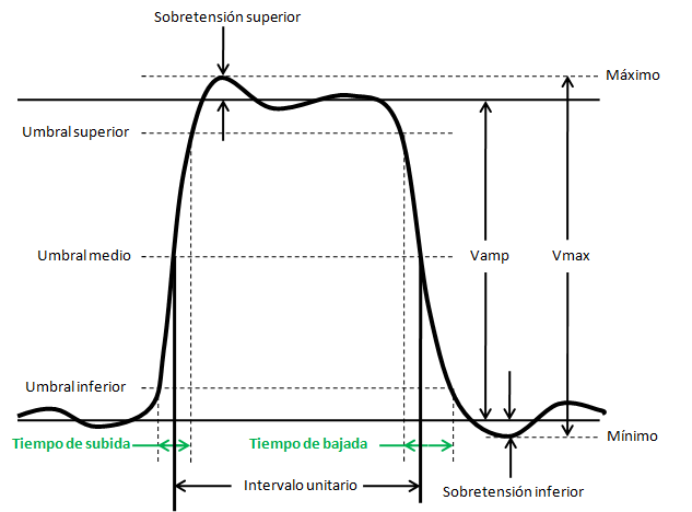 Parametros del pulso del diagrama de ojo